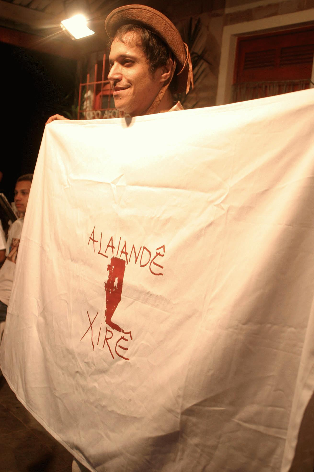 Ricardo Bittencourt, ator em cerimônia do Terreiro Ilê Axé Opô Afonjá em Salvador, Bahia